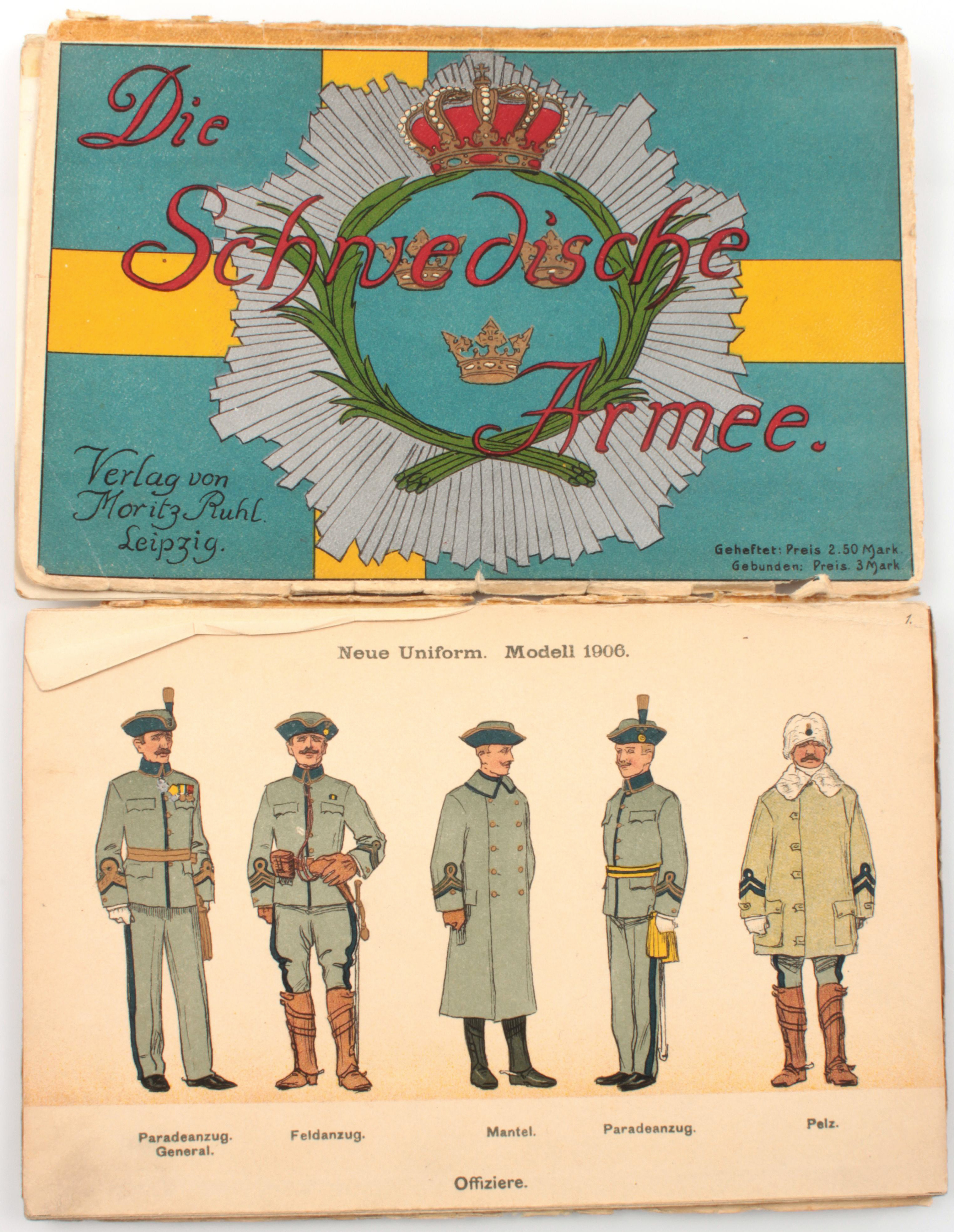 Leporello Die Schwedische Armee in ihrer gegenwärtigen Uniformierung, Verlag Moritz Ruhl, Leipzig (ohne Jahr, wohl um 1906 bis 1914)